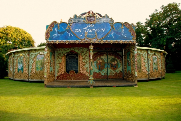 Le Magic Mirrors